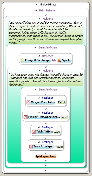 Programmierung_WIG_alsterdrache_GC45K1D_88